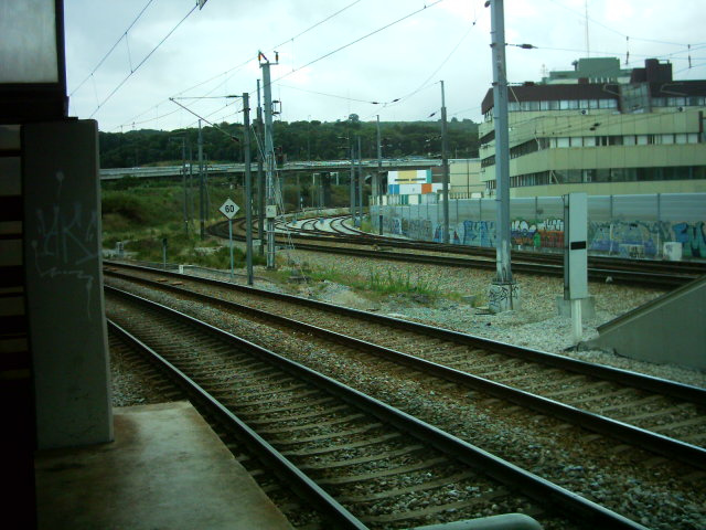 Concordância de Sete Rios a partir da Linha de Cintura, vista da estação ferroviária de Sete Rios.